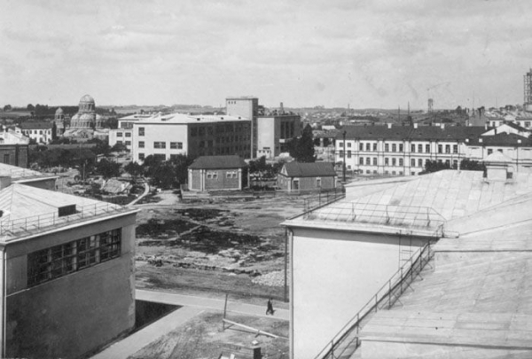 БДУ. Панарама Універсітэцкага гарадка